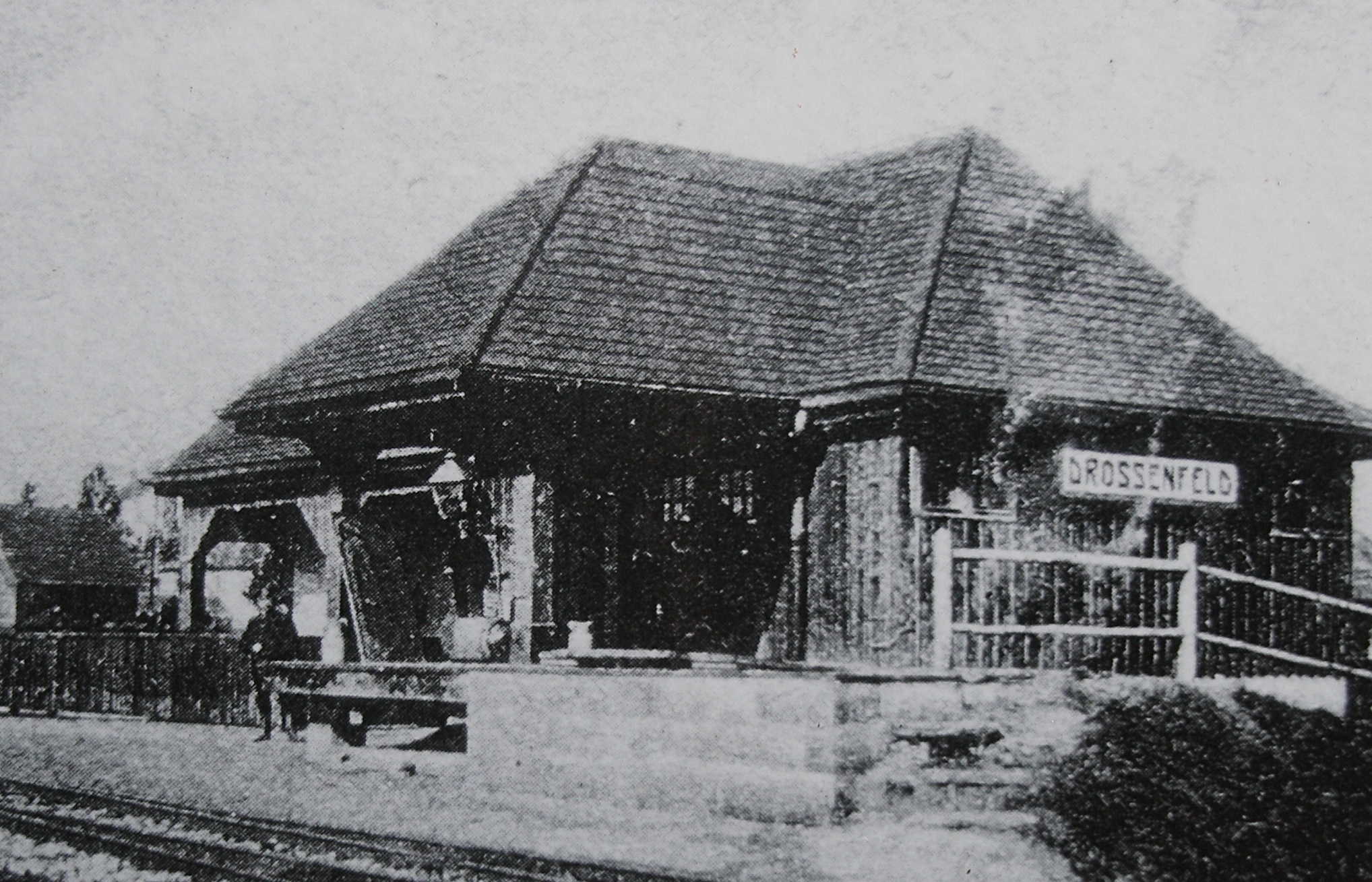 Bahnhof Drossenfeld auf einer Infotafel am Ort